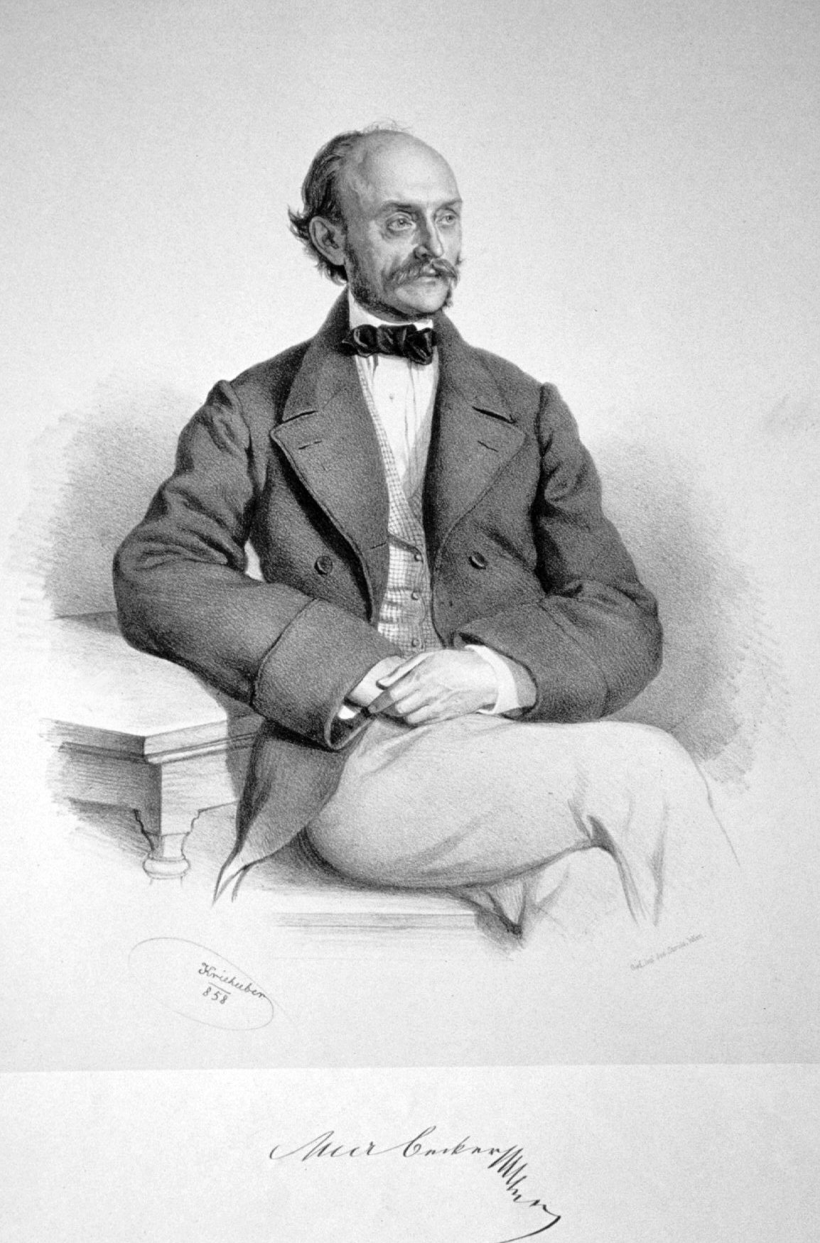 Moritz Alois Becker (1812-1887), Lehrer der Kinder Kaiser Franz Josef I. Lithographie von Josef Kriehuber, 1858